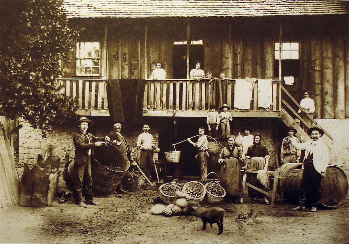 Retrato da família Boff em sua residência.